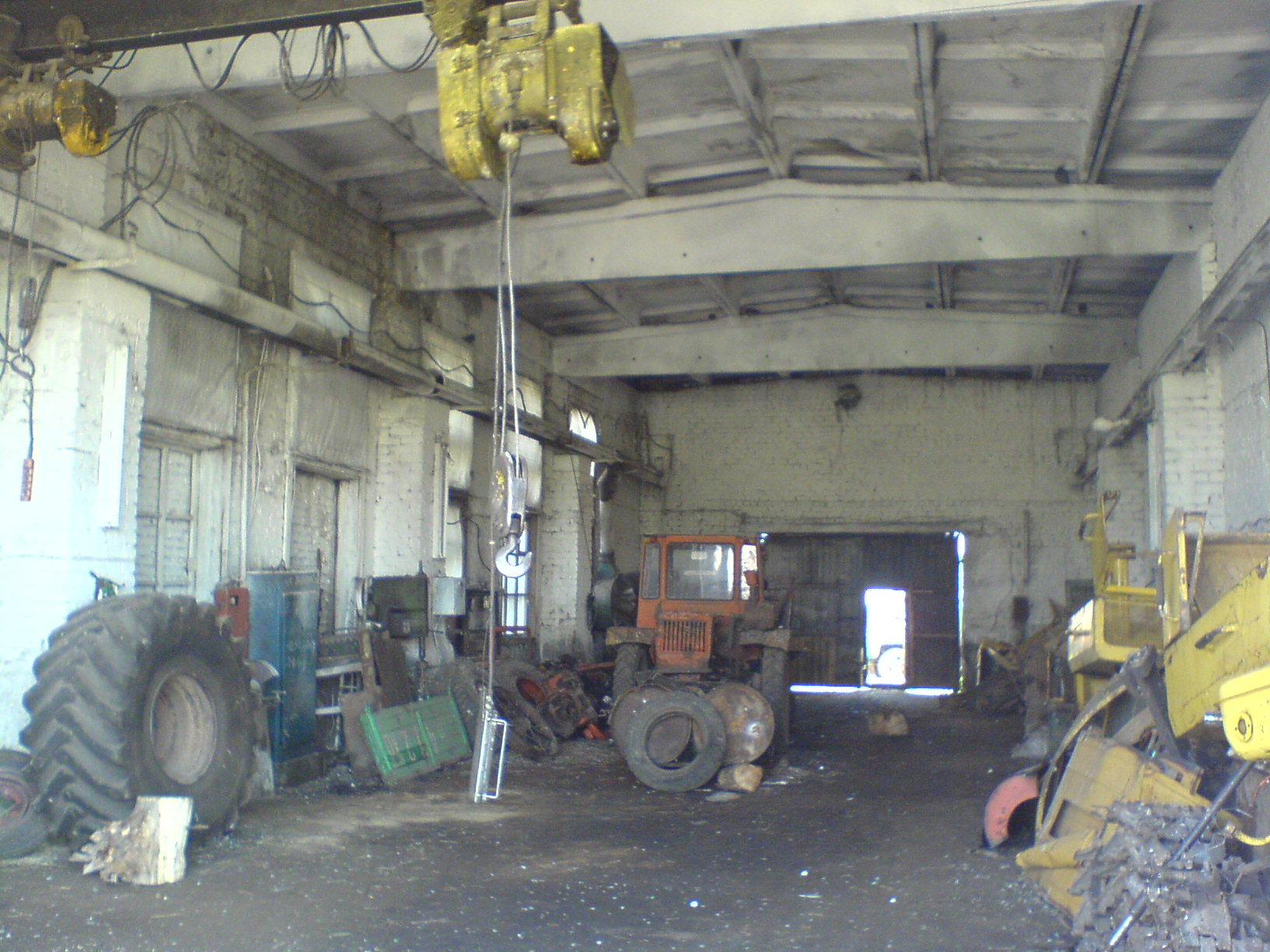 Главное помещение здания машинно-тракторной мастерской (машинно-тракторной станции) в хуторе Рубёжном Фроловского района Волгоградской области, Россия